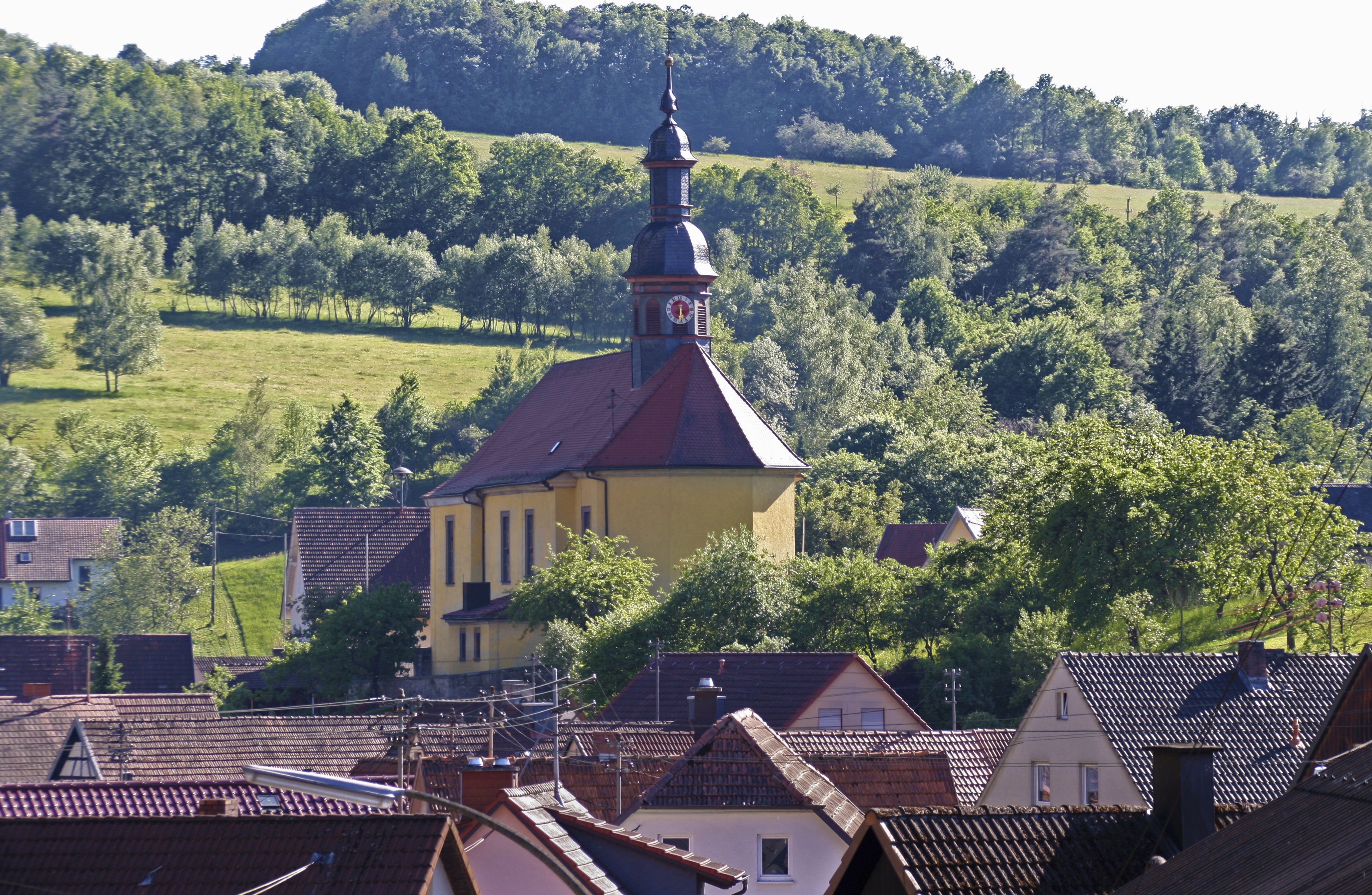 Blick aus etwa nordöstlicher Richtung auf die Kirche von Schmalwasser, Gemeinde Sandberg, Landkreis Rhön-Grabfeld